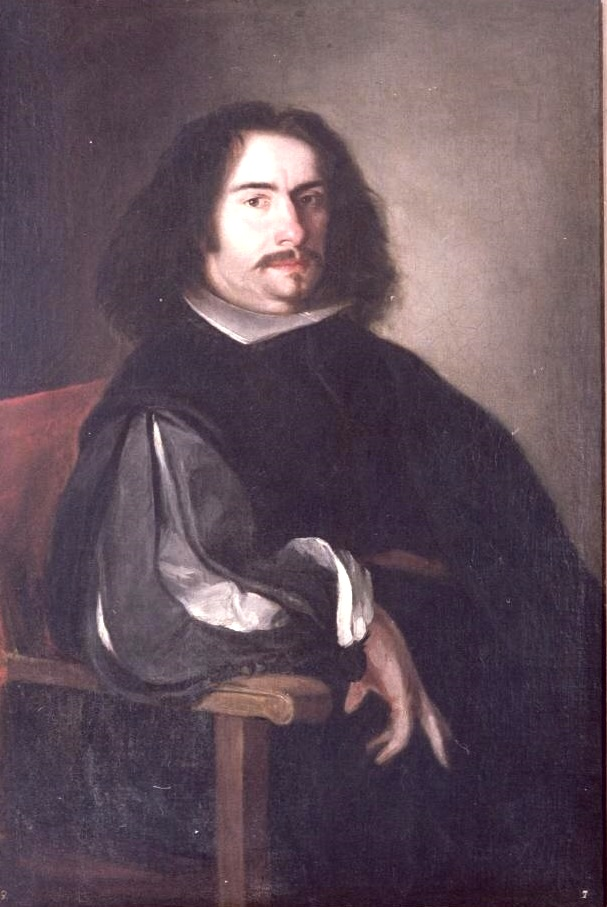 Retrato del dramaturgo español Agustín Moreto y Cavana (1618-1669).